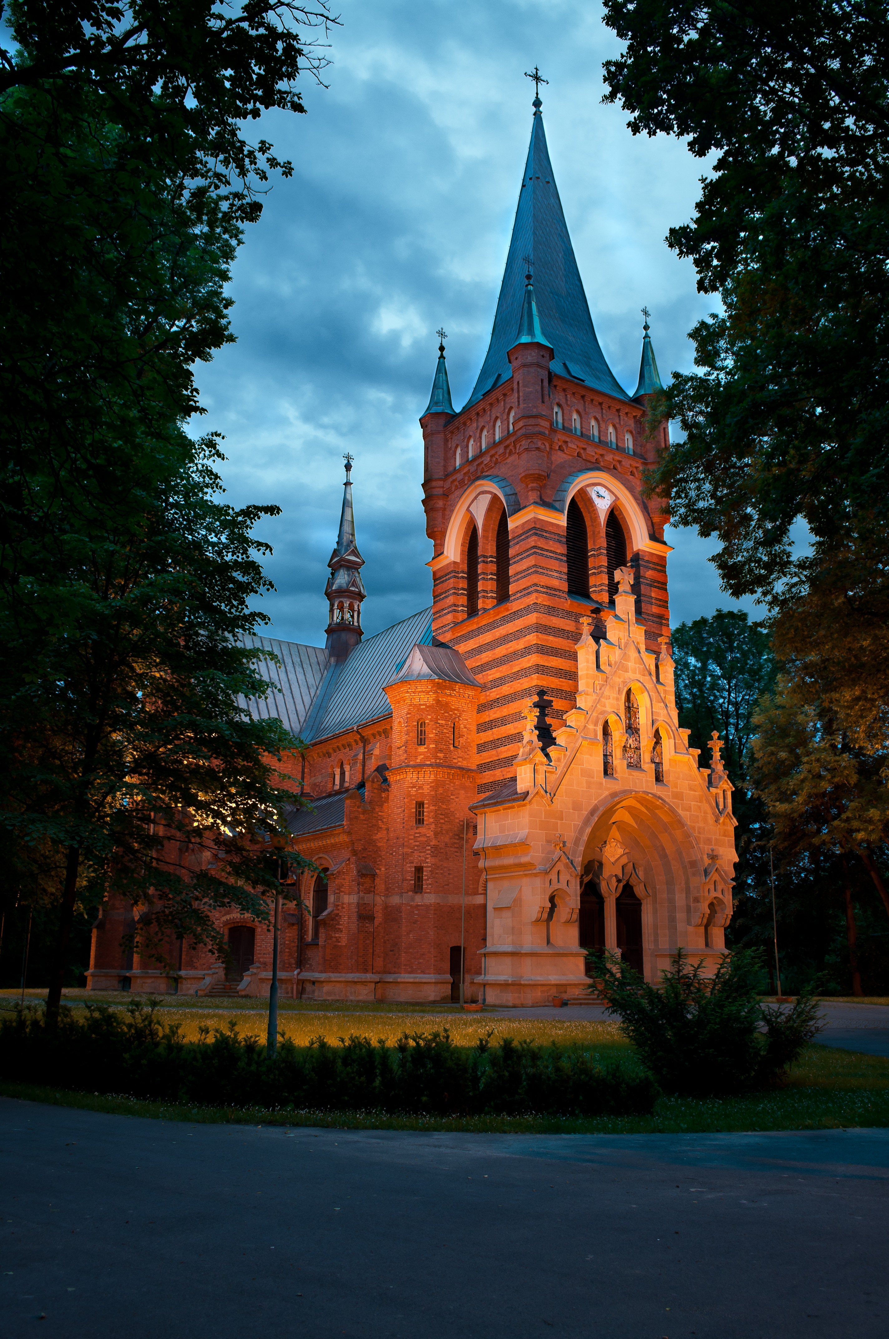 Poręba Radlna - kościół parafialny p.w. śś. Piotra i Pawła (zabytek nr A-425 z 30.12.1974)